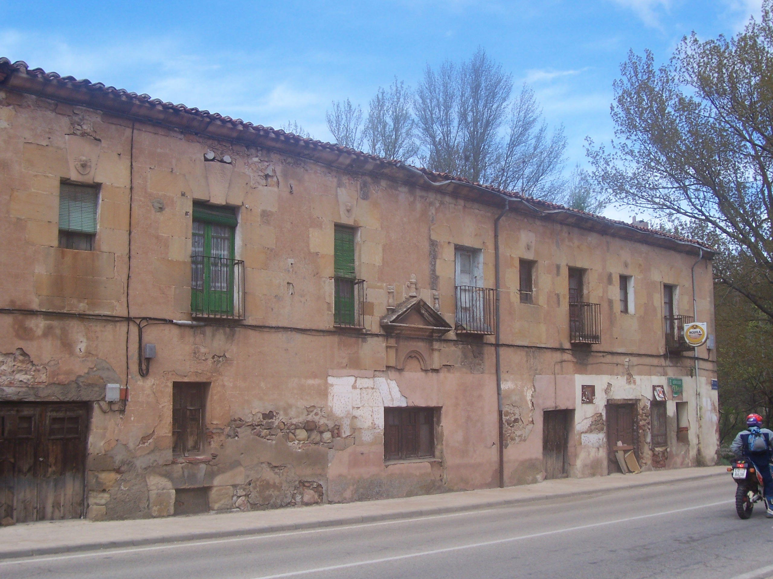 Ruinas del Convento de San Agustin.